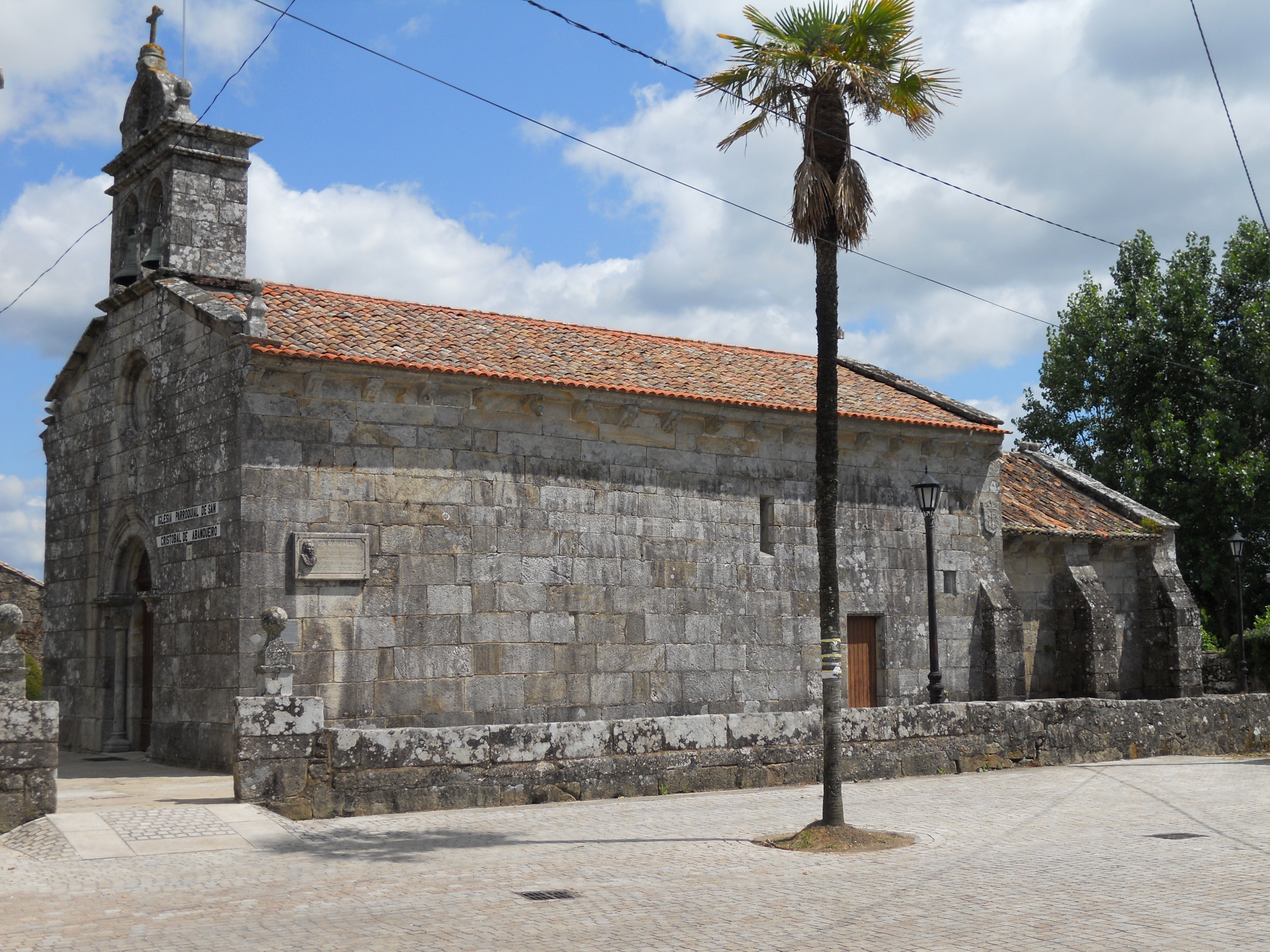 Construida a finales del siglo XII, sufre una severa reforma en el año 1708.